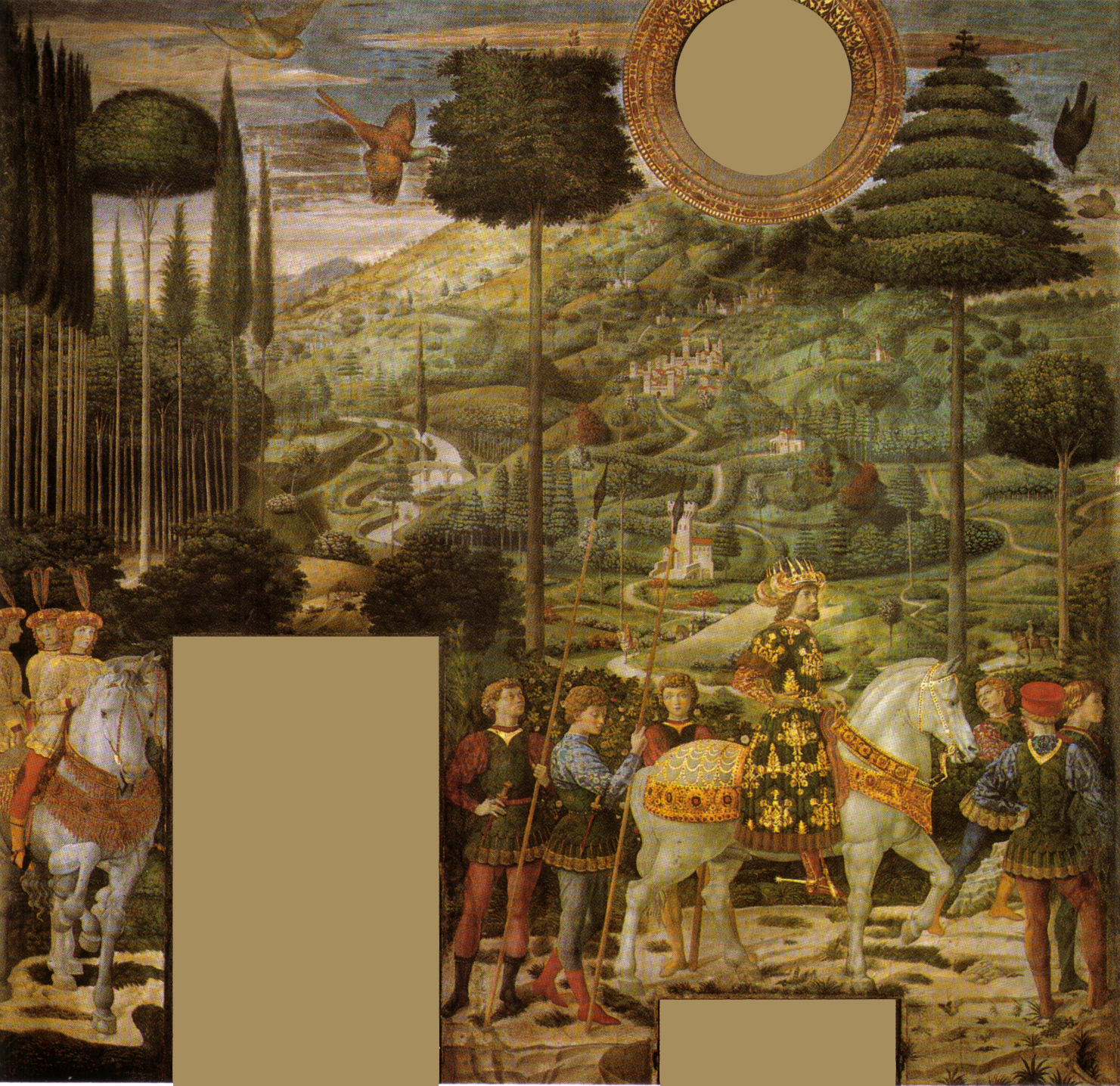 Byzantine emperor Ioannes VIII Palaiologos. Fresco by Benozzo Gozzoli, in the "Cappella dei Magi", at Palazzo Medici Riccardi in Florence, Italy.